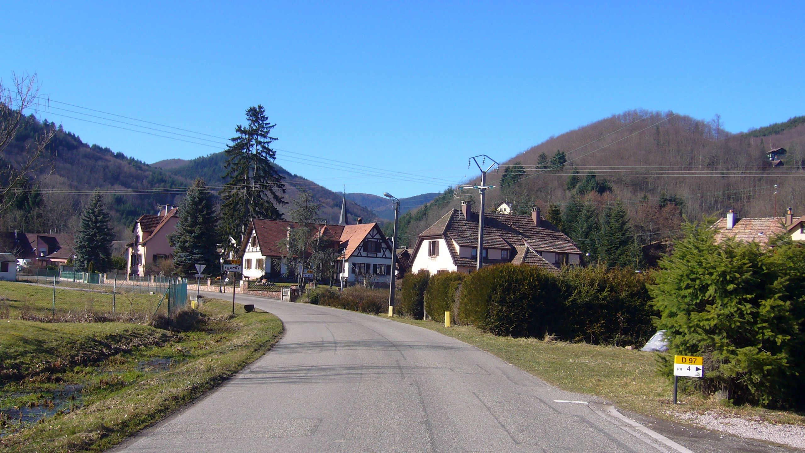 Entrée du village de Lalaye